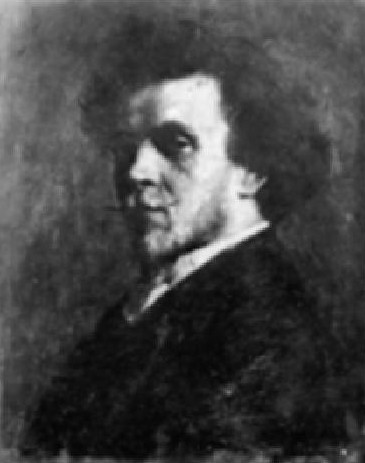 Josef Jakší (1874-1908), český malíř.